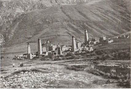 Башенный комплекс с. Таргим